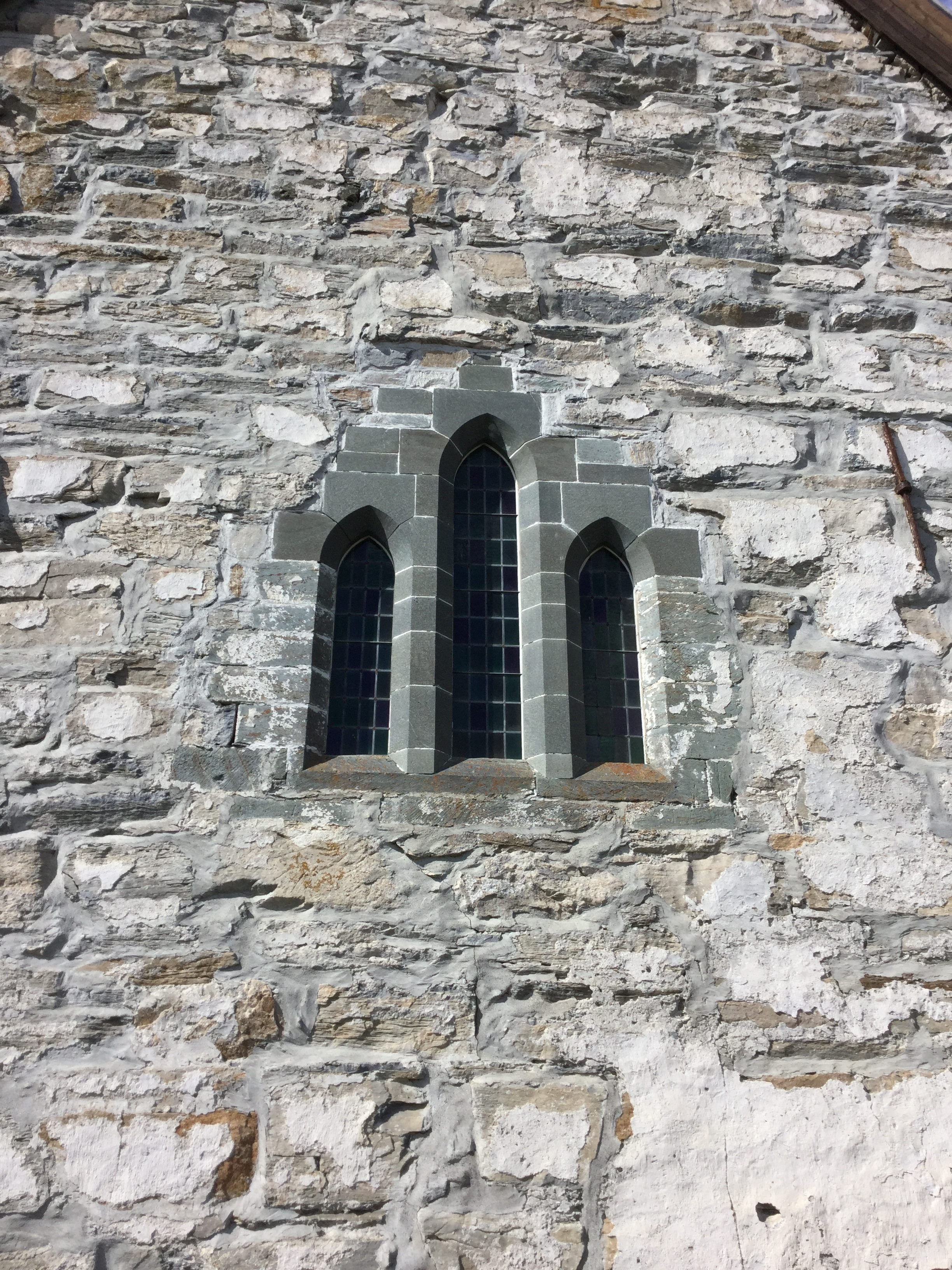 Østveggen på Sakshaug gamle kirke med gotiske vinduer